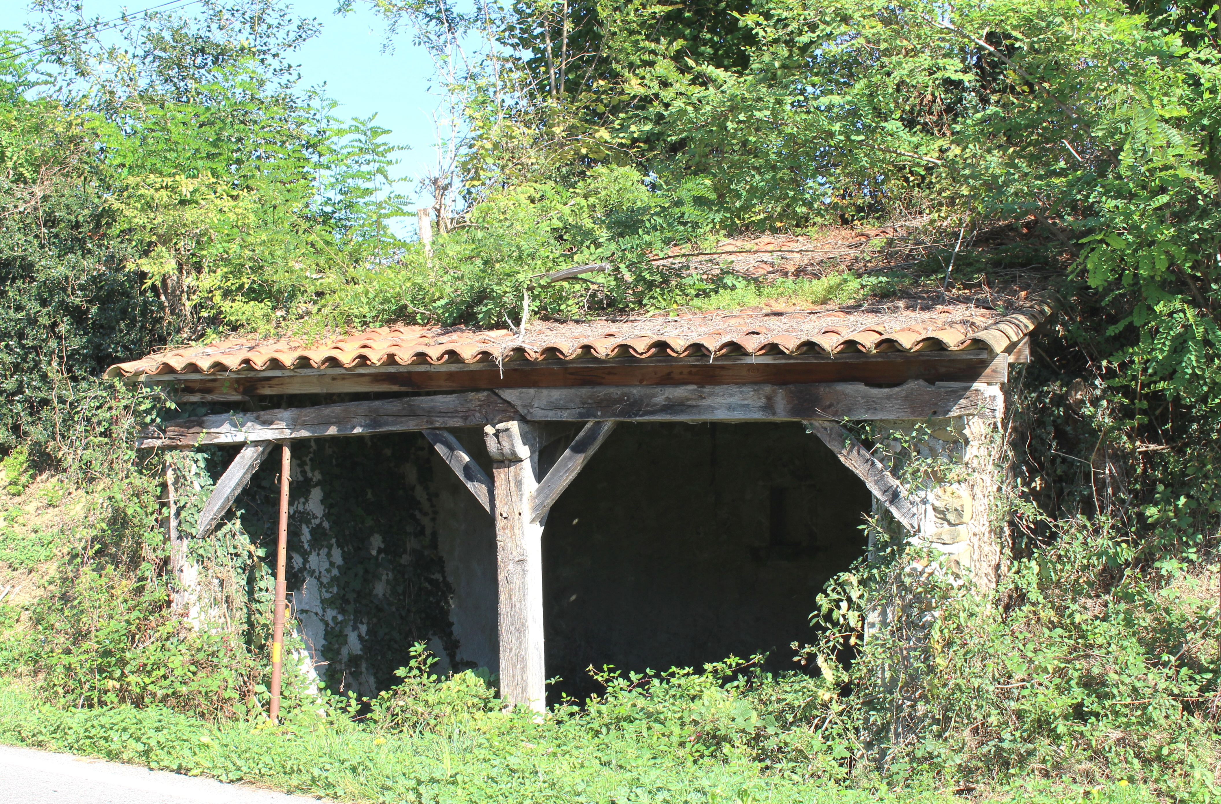 Lavoir de Cantaous (Hautes-Pyrénées)